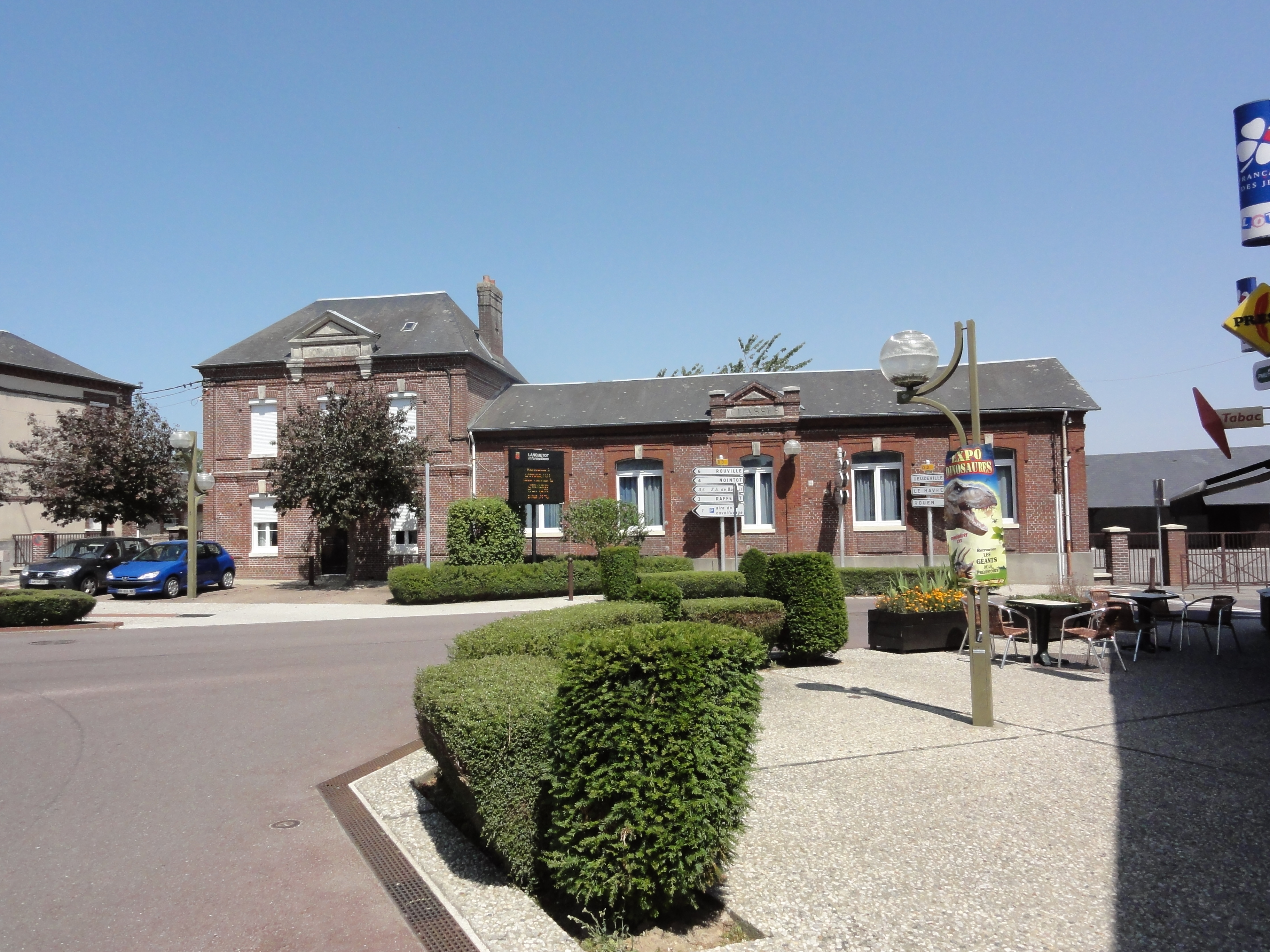 Lanquetot (Seine-Mar.) école